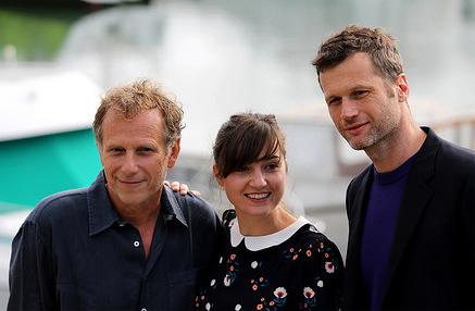 L'Actrice Nina Meurisse entourée des Acteurs Charles Berling et Robert Plagnol au Festival de la Fiction TV à La Rochelle en 2016 à l'affiche du film "Glacé"